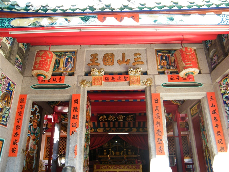 汕头达濠王爷宫三山国王正门